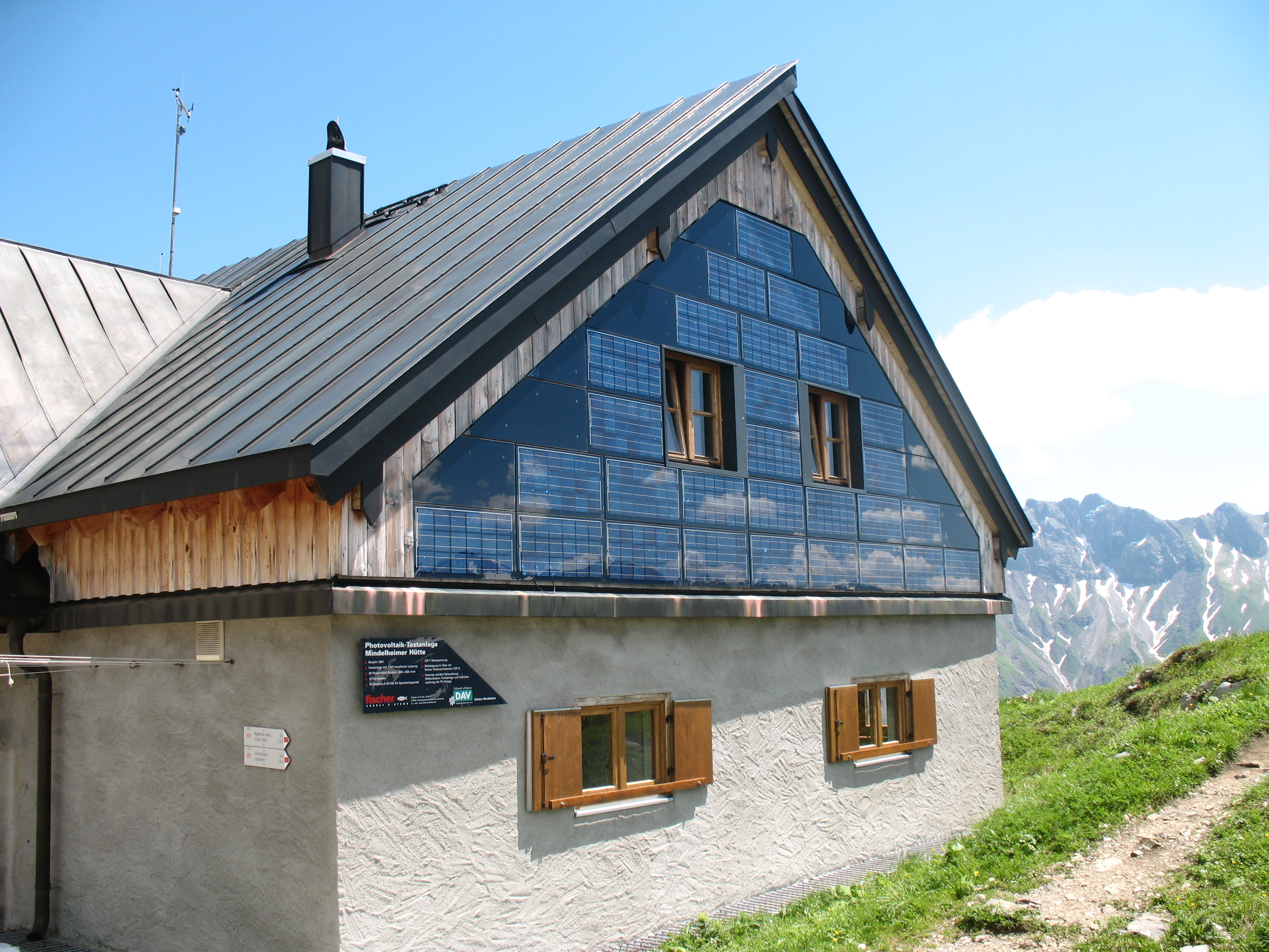 Photovoltaik-Testanlage am Winterraum der Mindelheimer Hütte (2013 m).